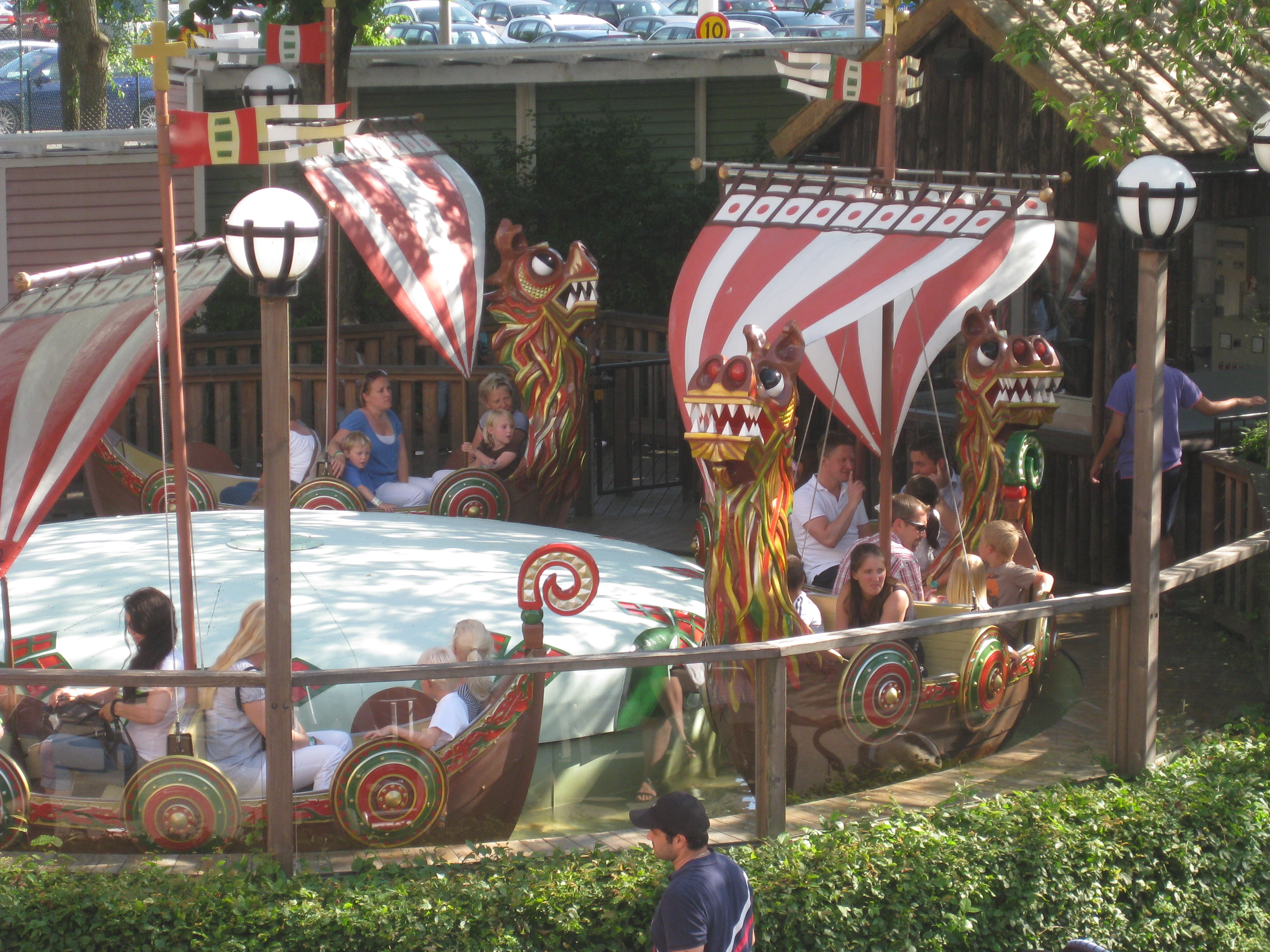 Drakbåtarna på Liseberg.